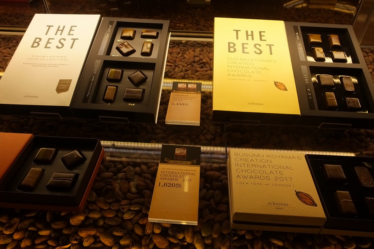 PATISSIER eS koyama - チョコレート専門店「ROZILLA」 パティシエ エス コヤマ 小山進